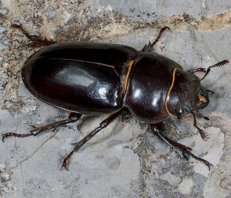 Lucanus barbarossa ejemplar hembra